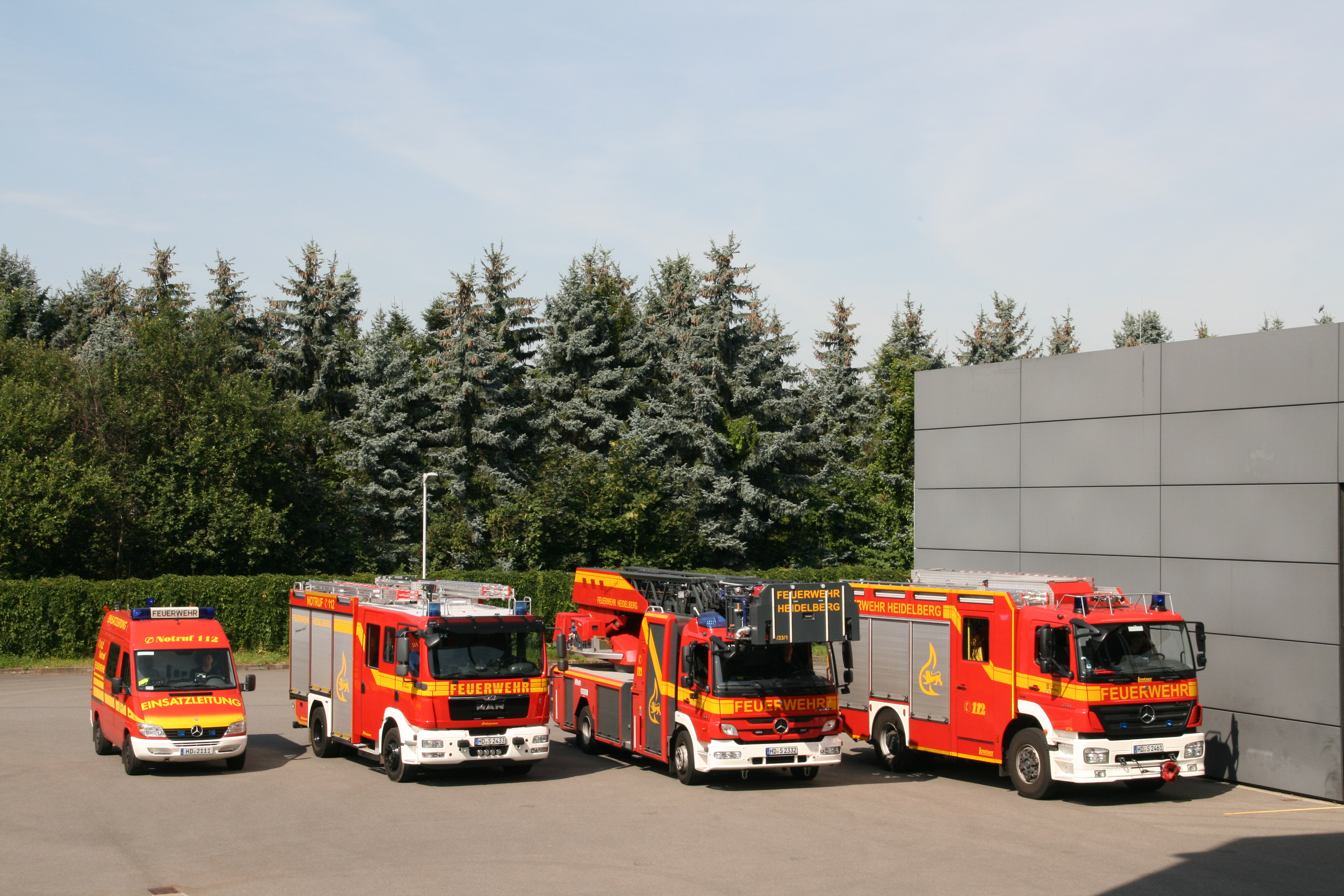 Löschzug Berufsfeuerwehr Heidelberg im Jahr 2016 ELW HLF10 DLA(K) 23/12 LF24